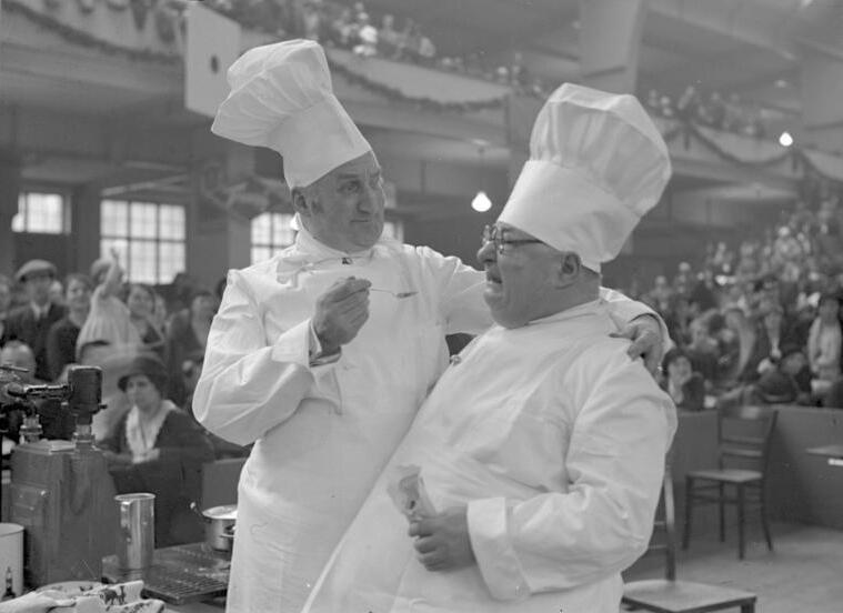 Deutsche Filmschauspieler kochen um die Wette ! Auf der Berliner Kochkunstausstellung in den Ausstellungshallen am Kaiserdamm zeigten die prominentesten deutschen Schauspieler ihre Kunst im Kochen. Der Filmschauspieler von Ledebur lässt den bekannten Film-Komiker Henry Bender von seiner Speise kosten.